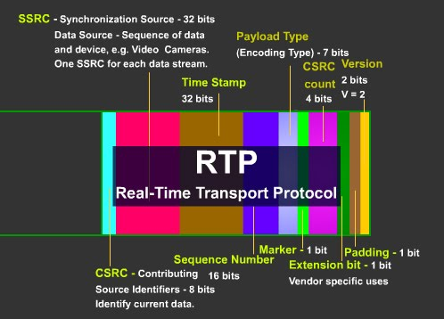 Монгол: Зураг.2 Толгой мэдээллийн бүтэц